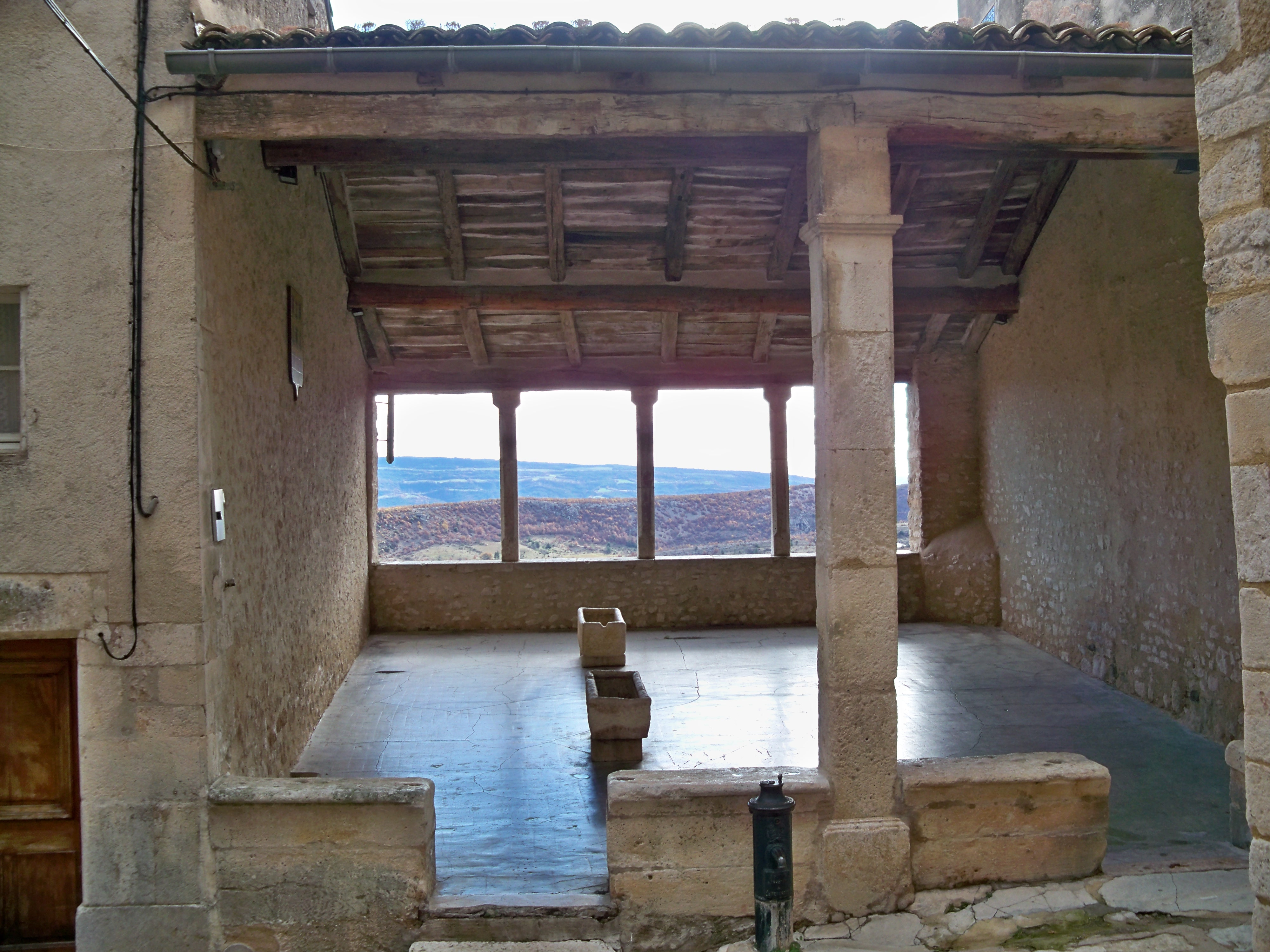 Halles à Simiane la Rotonde (04)